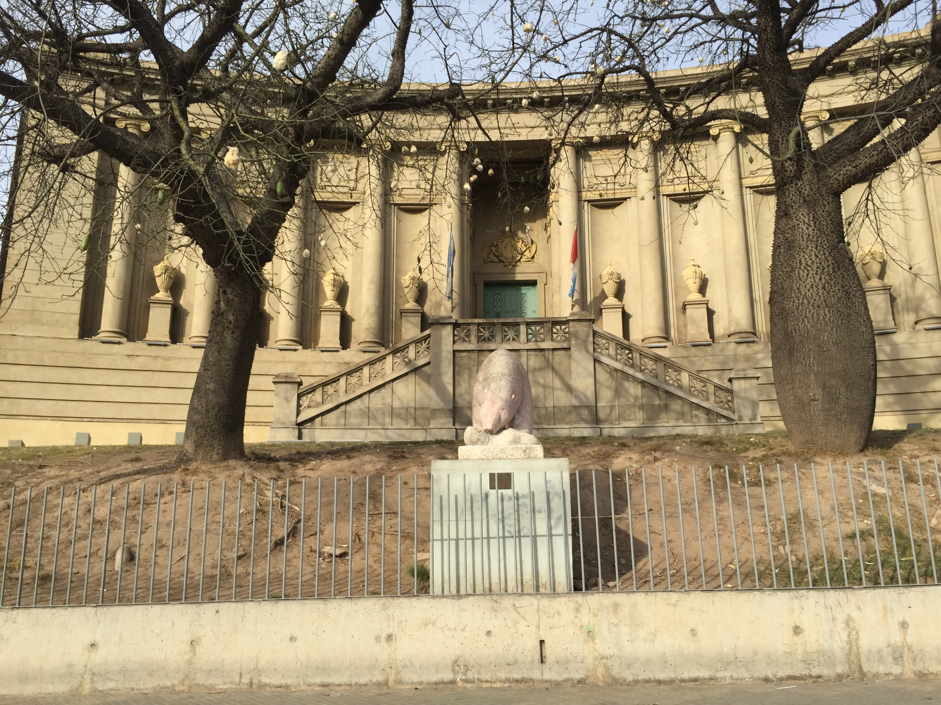 Fachada principal del museo,vista desde la Avenida Poeta Lugones, en la provincia de Cordoba